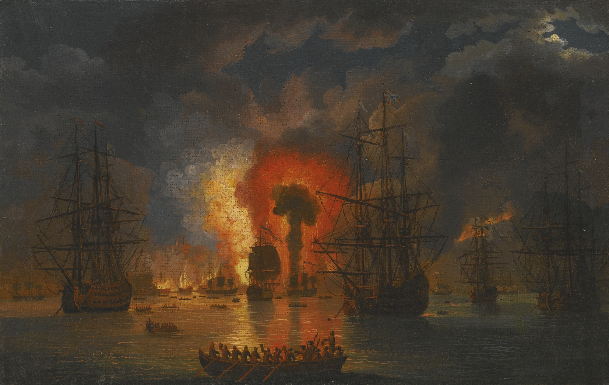 Это картина немецкого художника Якоба Филиппа Гаккерта «Сожжение турецкого флота в бухте Чесма». Картина написана художником в 1772 году как часть общей его работы, посвященной Чесменской битве 5-7 июля 1770 года, состоявшейся в ходе русско-турецкой войны 1769-1774 гг. Картина написана специально для Чесменского зала Большого Петергофского дворца в 1772 году. Описание картины. Три корабля: «Европа», «Ростислав» и «Не тронь меня» стоят на якоре у входа в гавань, вблизи вражеского флота, который они постоянно обстреливают. «Саратов» стоит несколько позади, чтобы в нужный момент заменить один из этих кораблей. Фрегат «Надежда» ведет огонь по батарее, состоящей из 22 пушек, «Африка» продолжает препятствовать развертыванию второй батареи. Бомбарда постоянно ведет огонь. поскольку ветер совсем утих, то граф Алексей Орлов послал шлюпки к этим кораблям, чтобы в случае опасности вывезти экипажи. Остальные корабли флота стоят на якоре. Четыре посланных брандера подожгли турецкий флот, часть которого уже горела от попадания раскаленных ядер с трех кораблей.На картине изображены два эффекта взорвавшегося корабля. Первый — это огромный огненный столб, превращающийся в облако, это длится три минуты, а затем, как видно во втором эффекте, превращается в красный огонь с искрами, из середины которого поднимается столб дыма, распространяющийся вверх, это тоже длится около трех минут. Уникальность картины в том, что на ней показаны 2 корабля, взорвавшихся один за другим, спустя три минуты, и продемонстрировать различные эффекты такого взрыва. Одновременно здесь видно, что пожар на вражеском флоте частично перекинулся и на часть города, и на ближайшие деревенские дома.